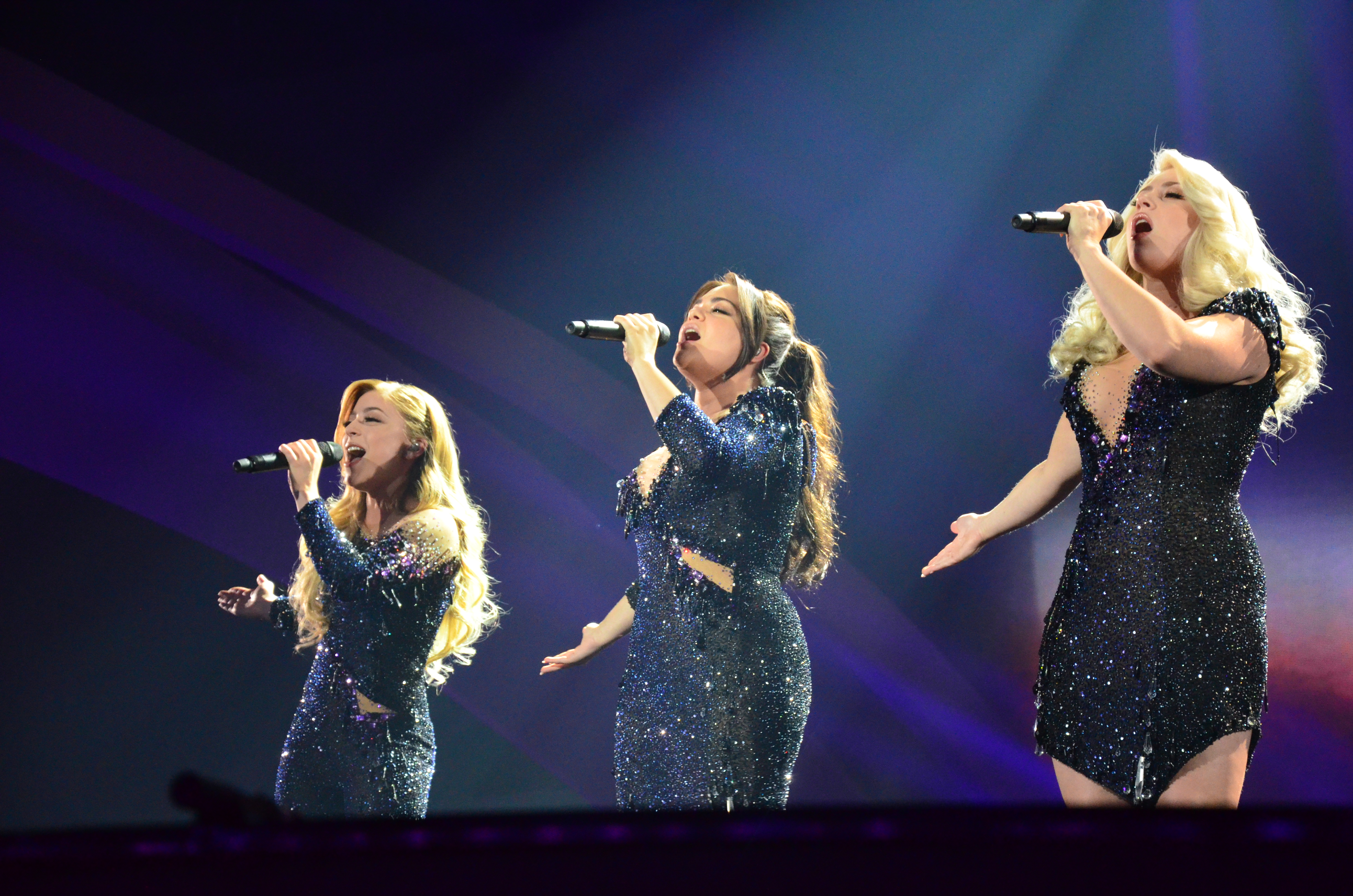 10 травня 2017 року у Києві відбулась генеральна репетиція 2 півфіналу "Євробачення".